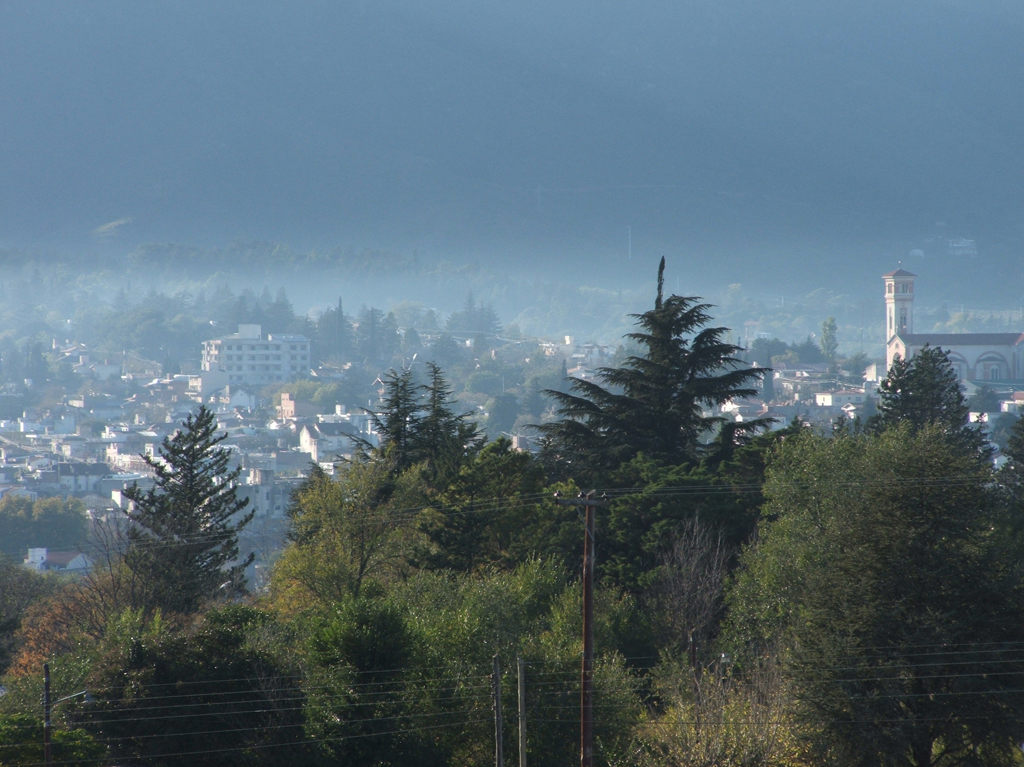 Esta imagen pertenece a La Falda, Córdoba, Argentina observada desde Betania, lugar dedicado al retiro espiritual